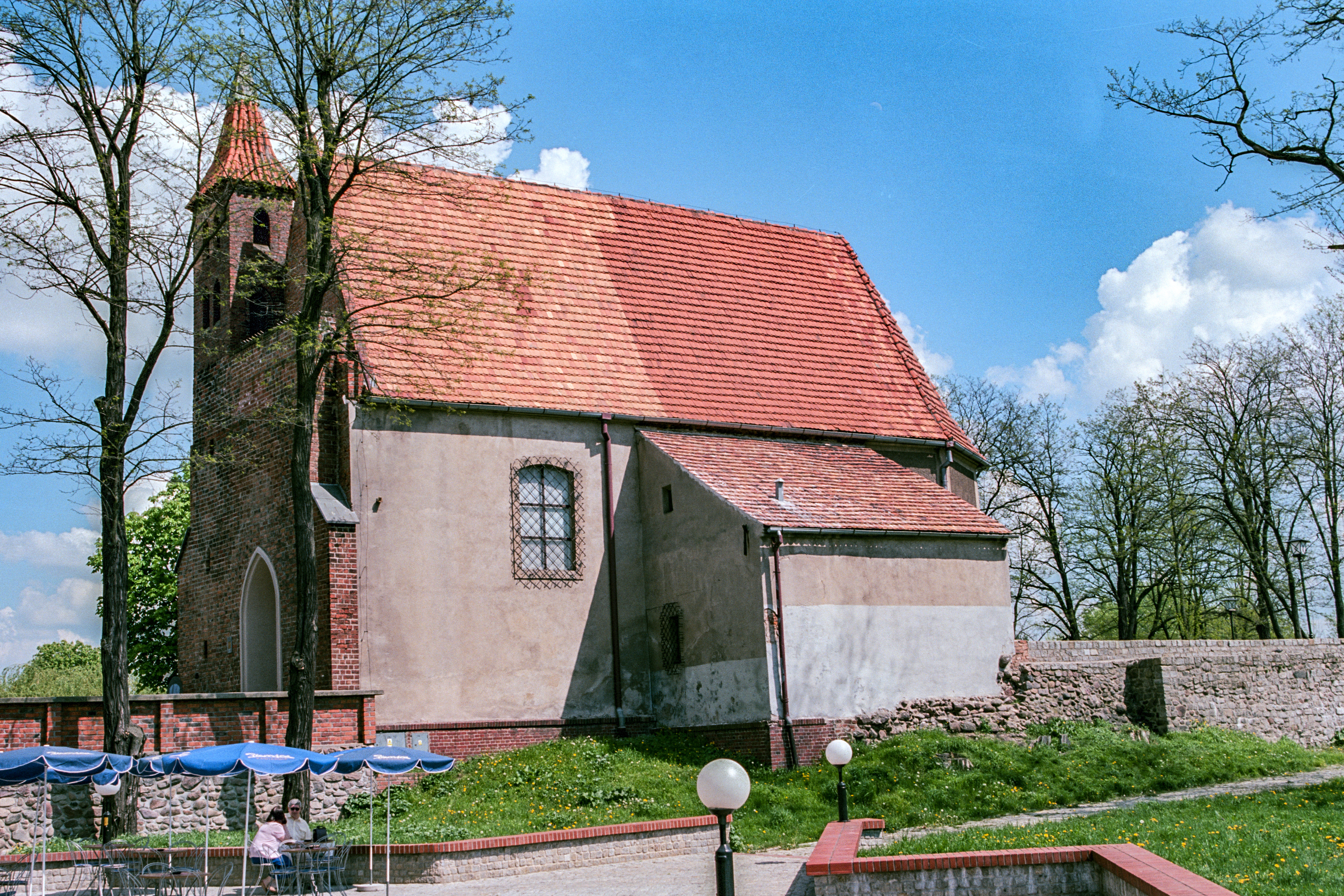 Lubin, kaplica zamkowa